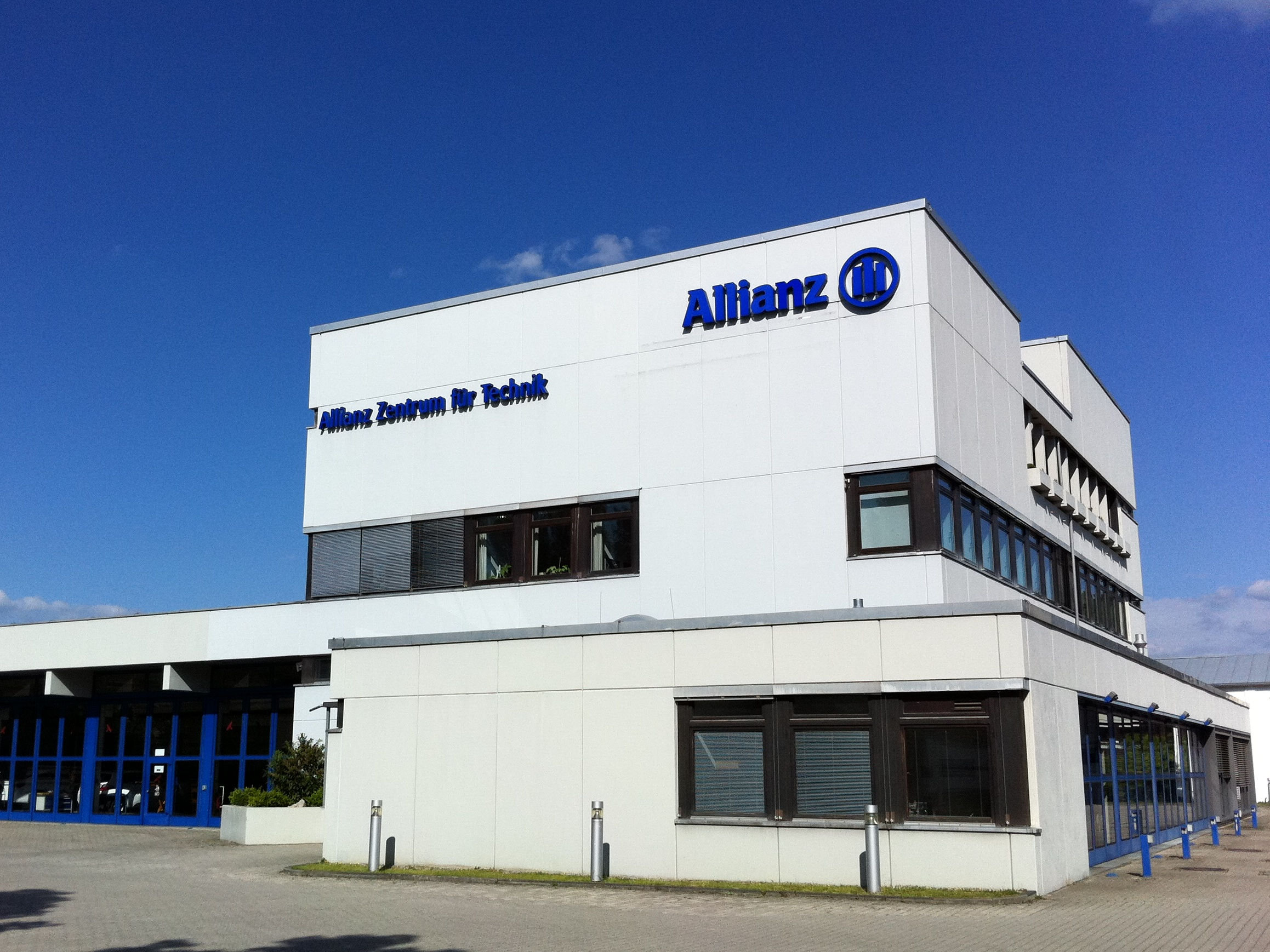 Allianz Zentrum für Technik ("AZT") in Ismaning, Landkreis München